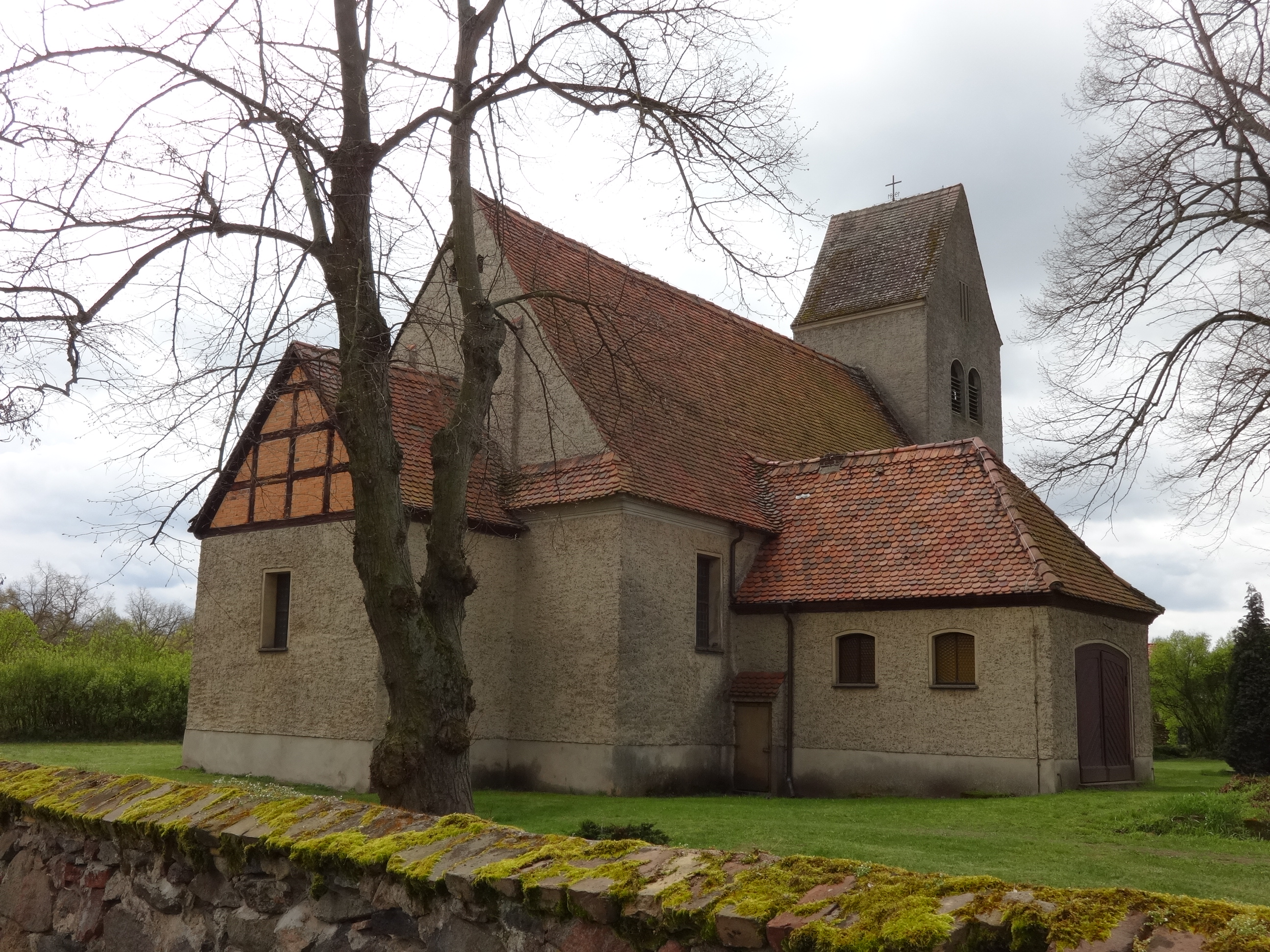 Die Dorfkirche in Trebbin ist ein Bauwerk aus dem 18. Jahrhundert, das vermutlich auf einem Vorgängerbau aus dem 14. Jahrhundert basiert. Im Innern befinden sich mehrere qualitätsvolle Ausstattungsstücke, darunter eine venezianische Fünte aus dem 11. Jahrhundert.